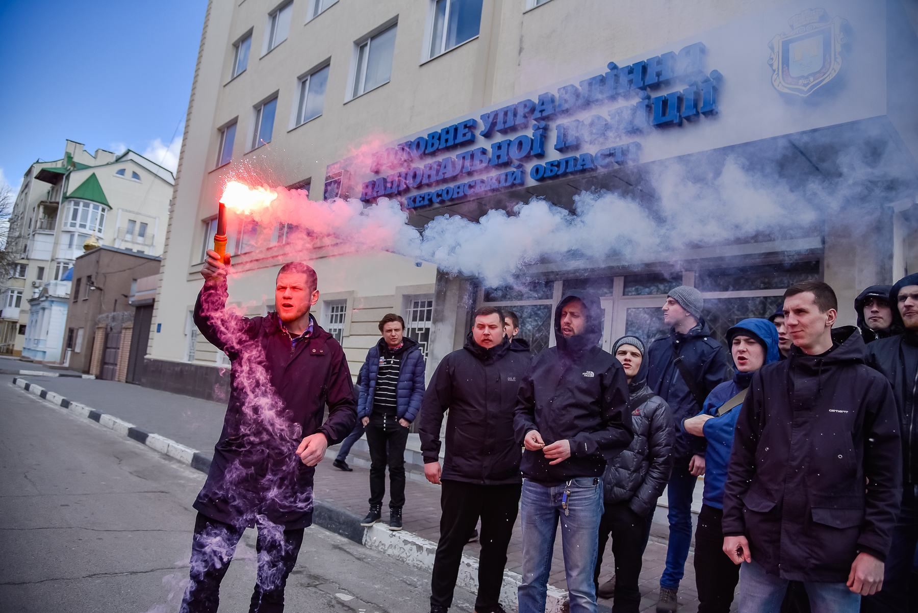 В Херсоні активісти та друзі Катерини Гандзюк провели кілька акцій, щоб нагадати - замовники вбивства Гандзюк досі на волі.